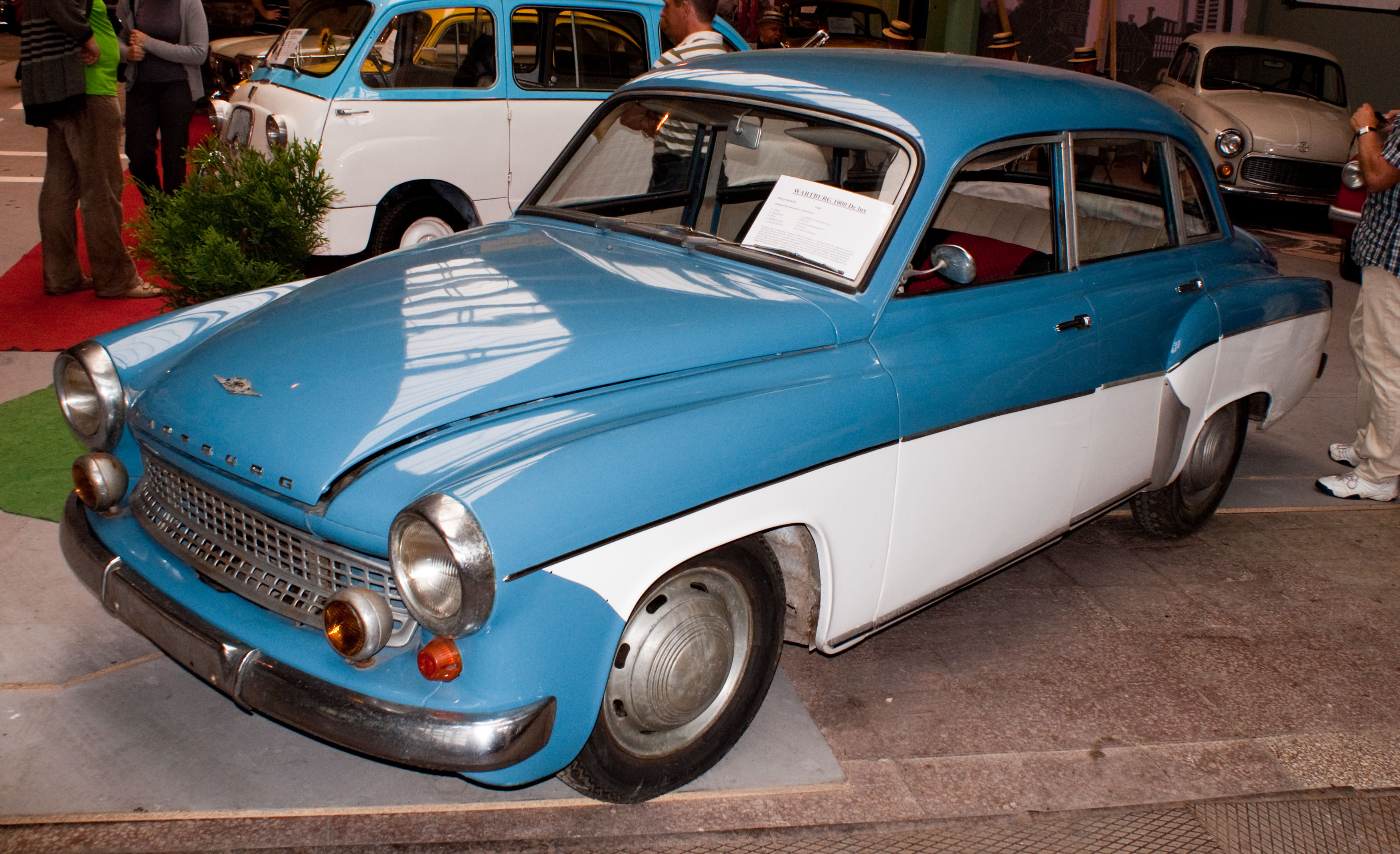 Wartburg 312 De Lux, rocznik 1965. Wystawa samochodów Prywatnego Muzeum Motoryzacji i Techniki w wytwórni Wódek Koneser.